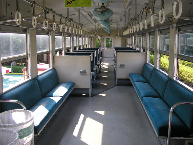 高知市内にて静態保存されているオハ50 11の車内